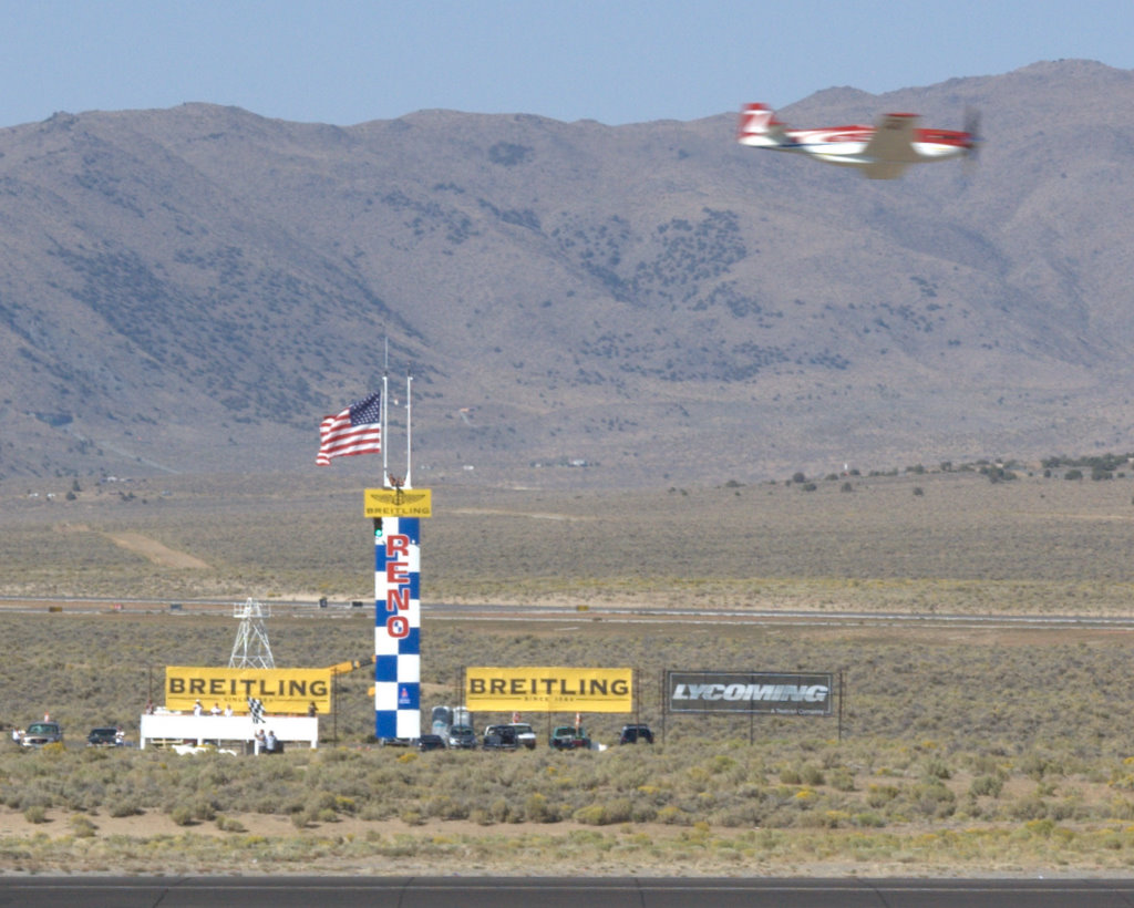 Reno Air Races 2008